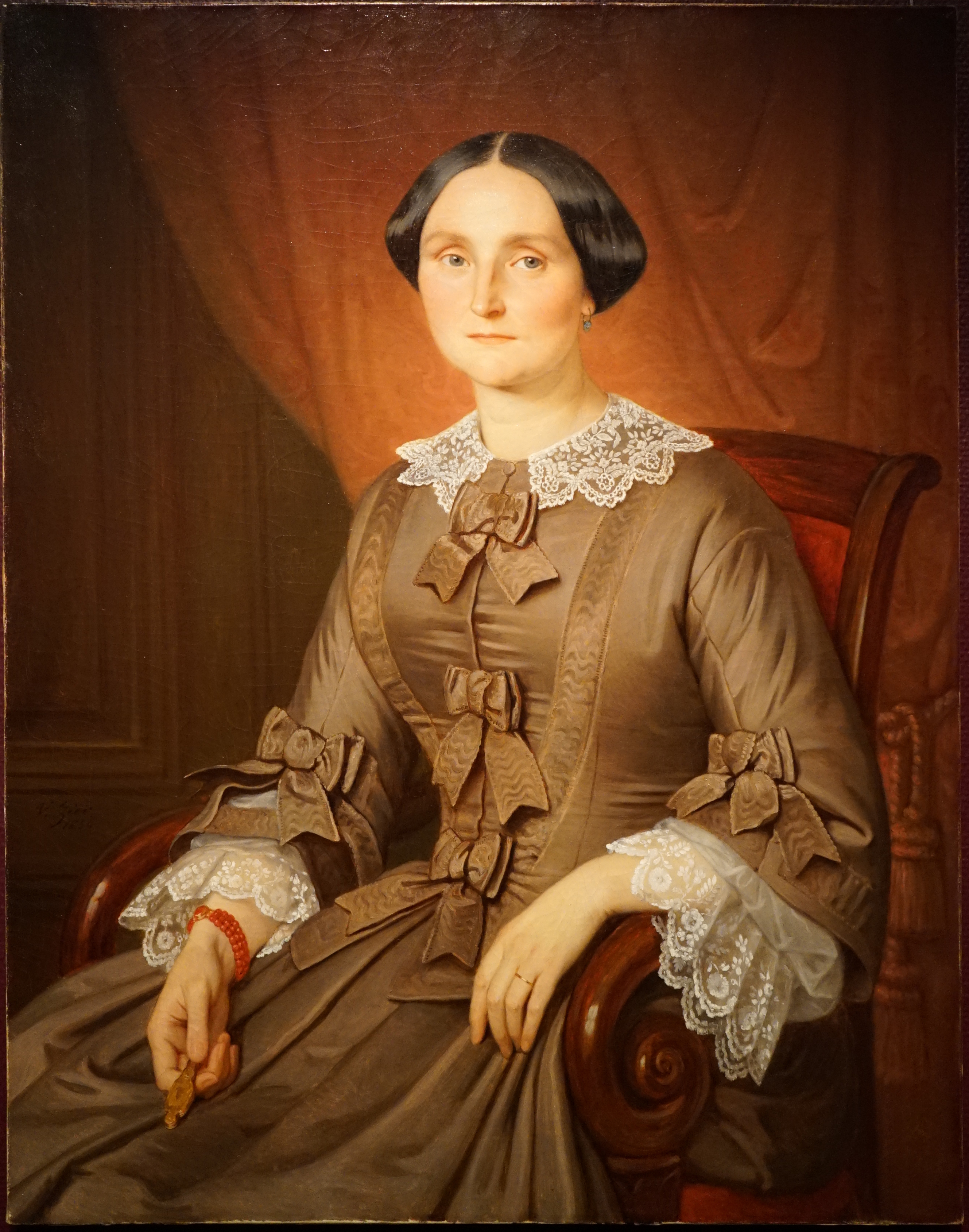 Présenté au musée lors de l'exposition temporaire "Campagne de restauration".